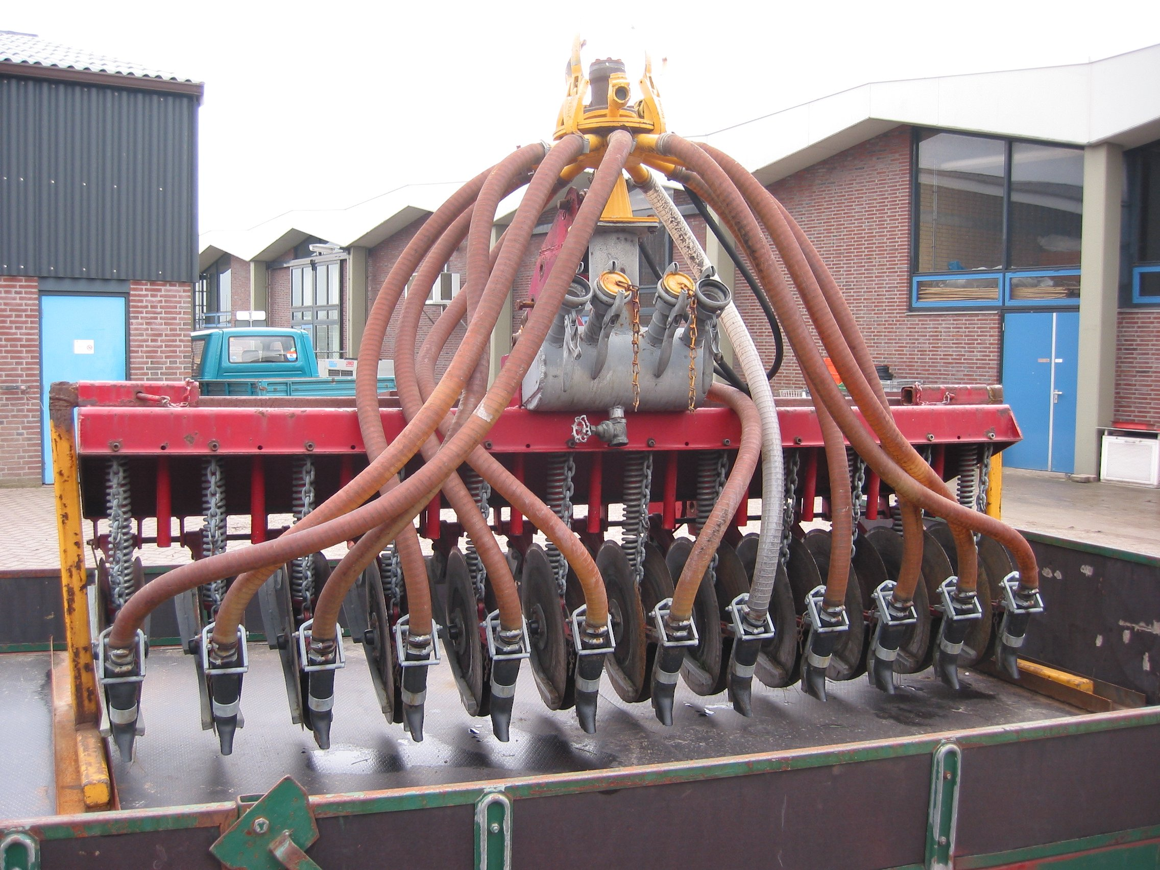 Sleufkouterbemester